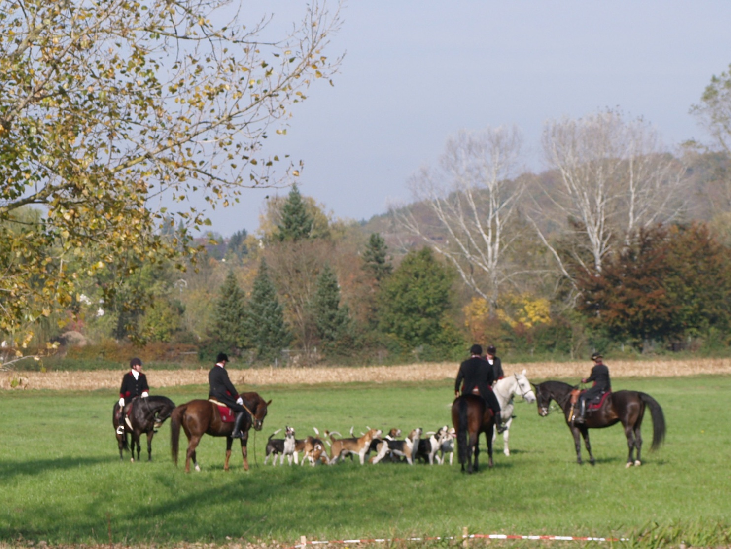 Pikeure halten Meute im Kreis. Stop bei einer Reitjagd.